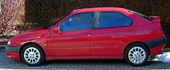 Bild eines Alfa Romeo 146 ti